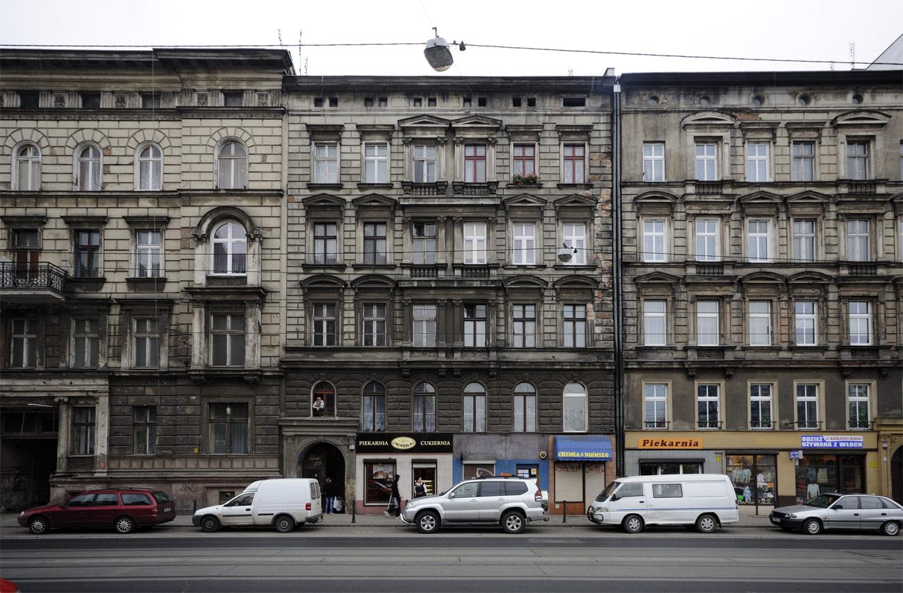 Traugutta 79.